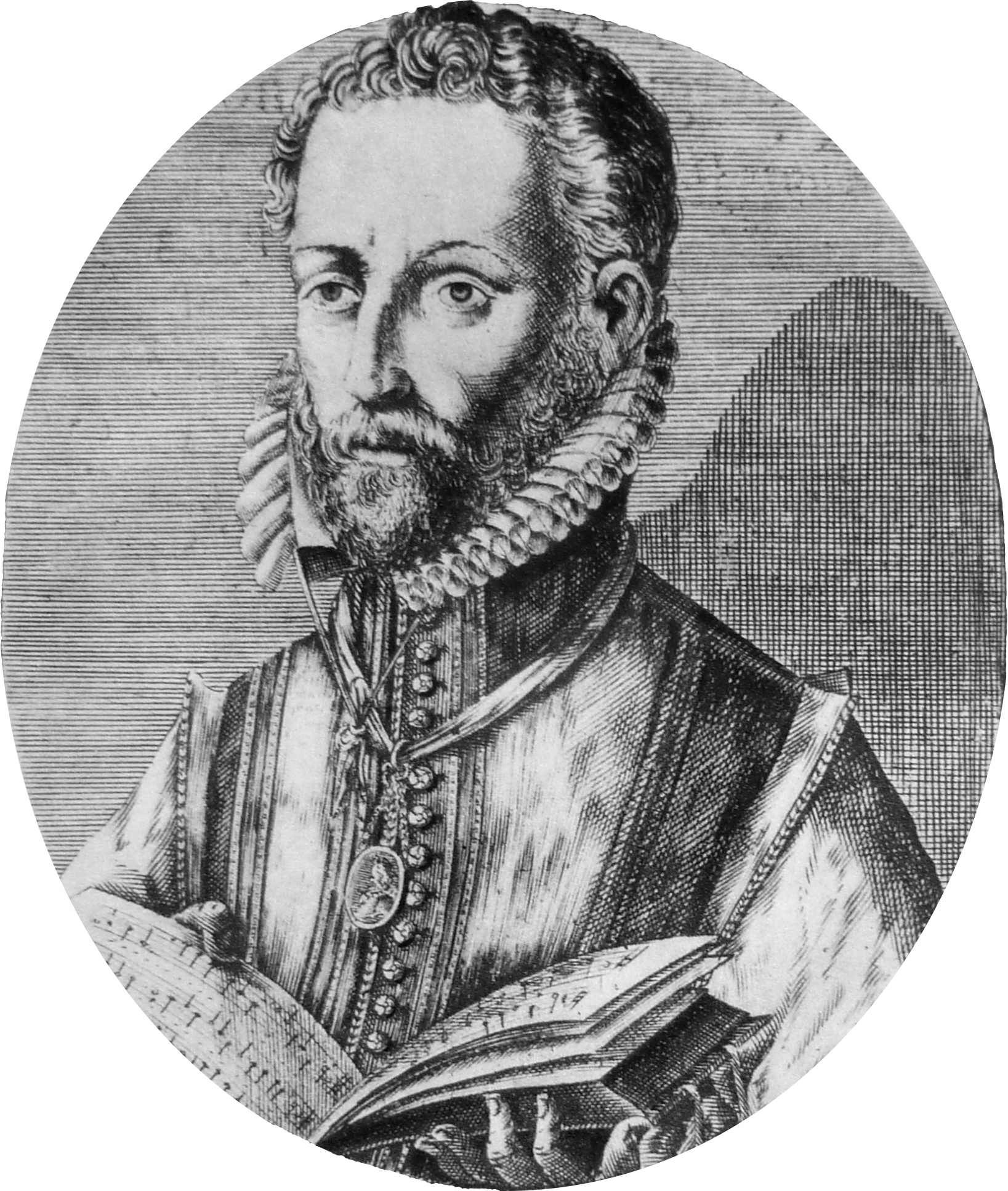 Orlando di Lasso, Kupferstich von René Boyvin